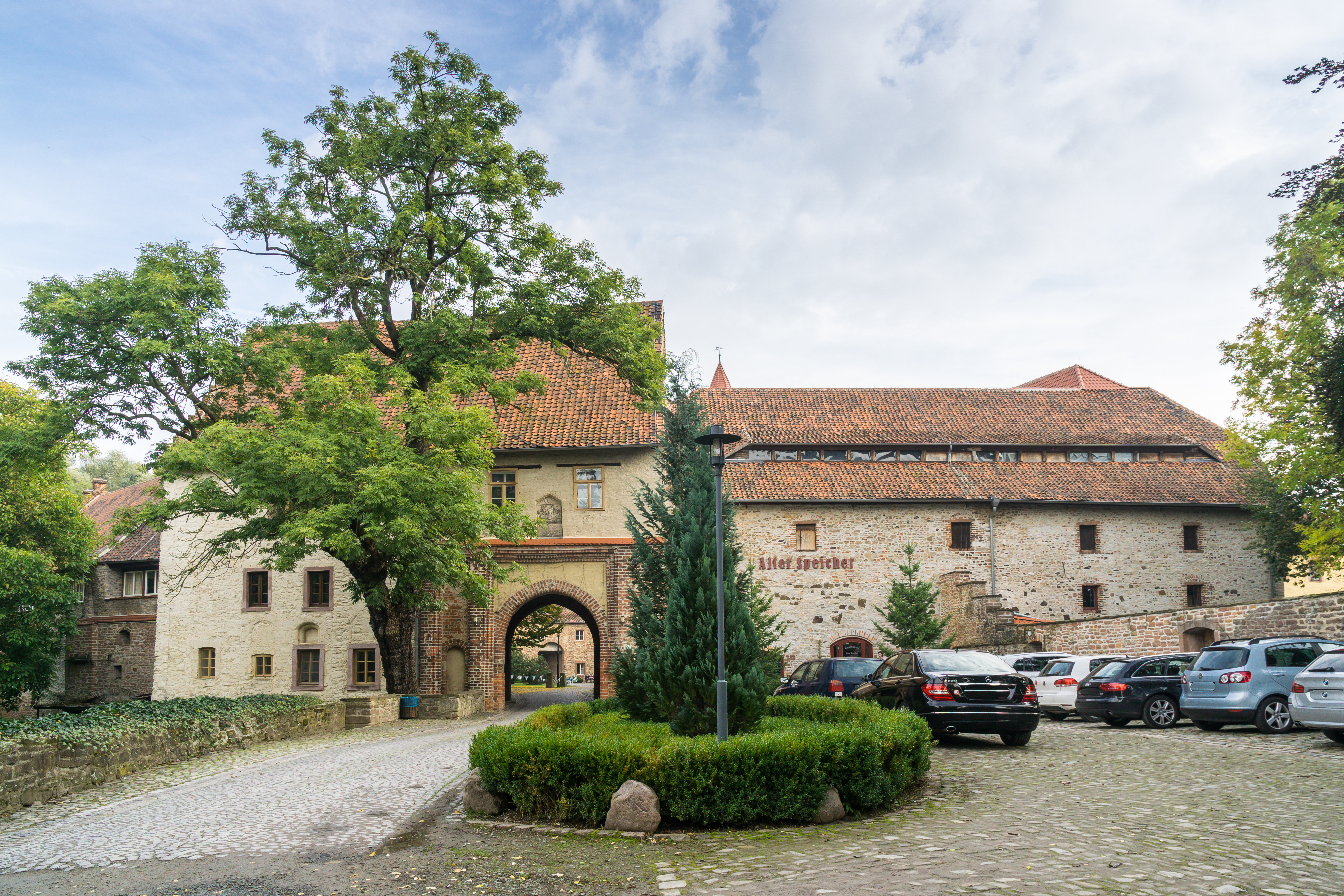 Schloss Altenhausen, Vorhof mit Torhaus (Andreastor) Schloßstraße 11-17 in Altenhausen